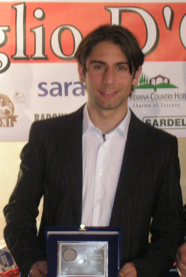 Diego Ulissi alla premiazione del Giglio d'Oro 2007